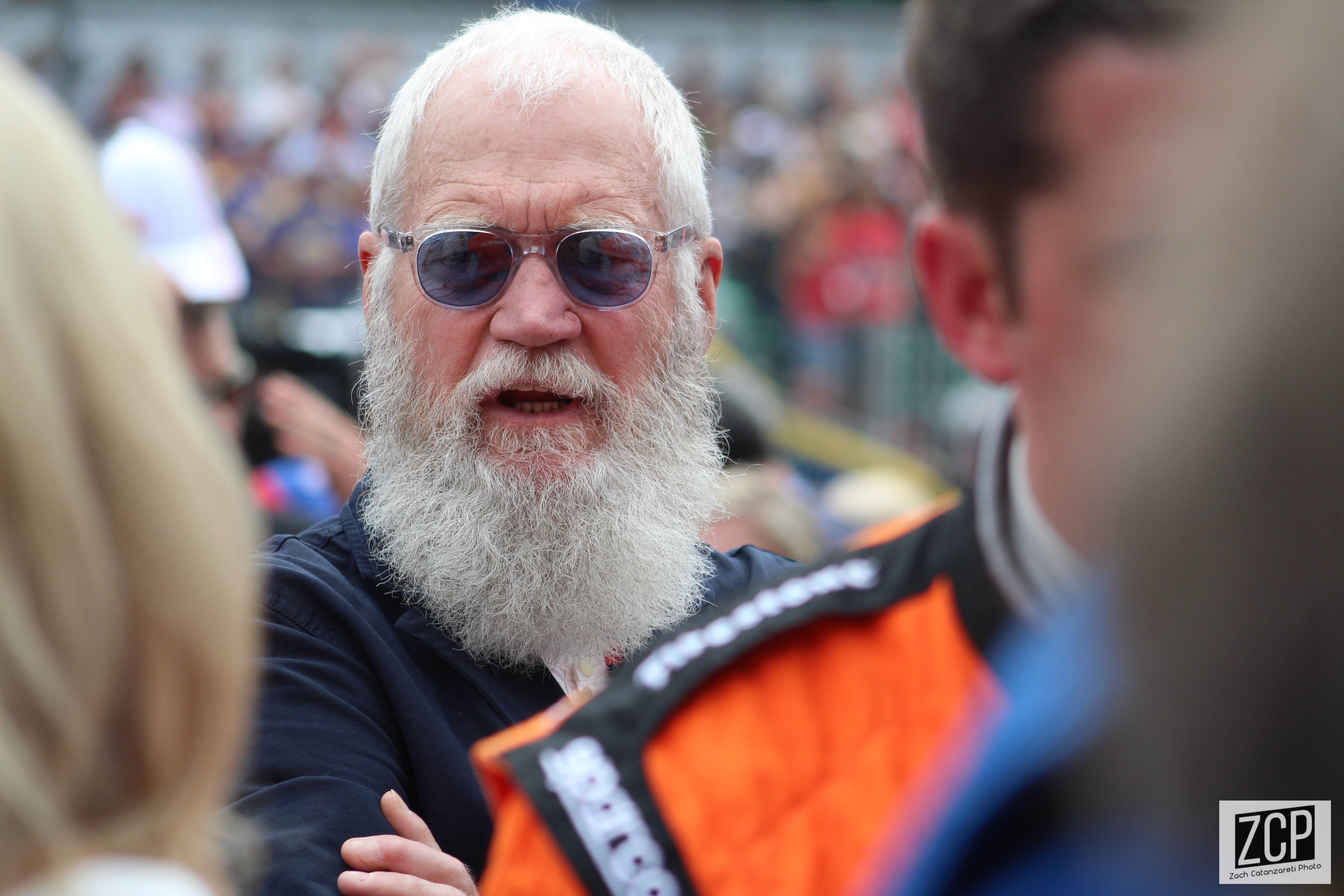 2019 Indianapolis 500